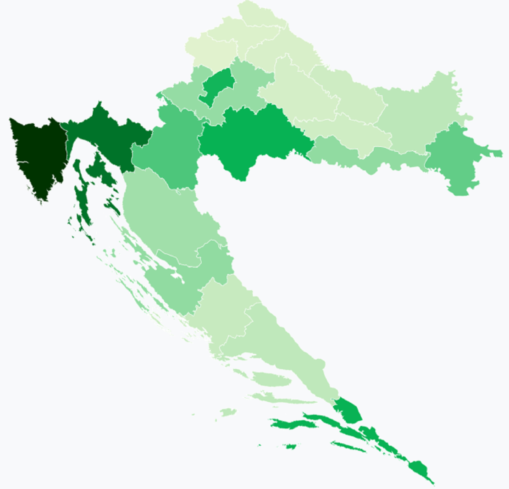 Procento muslimů v jednotlivých župách podle sčítání lidu z roku 2011